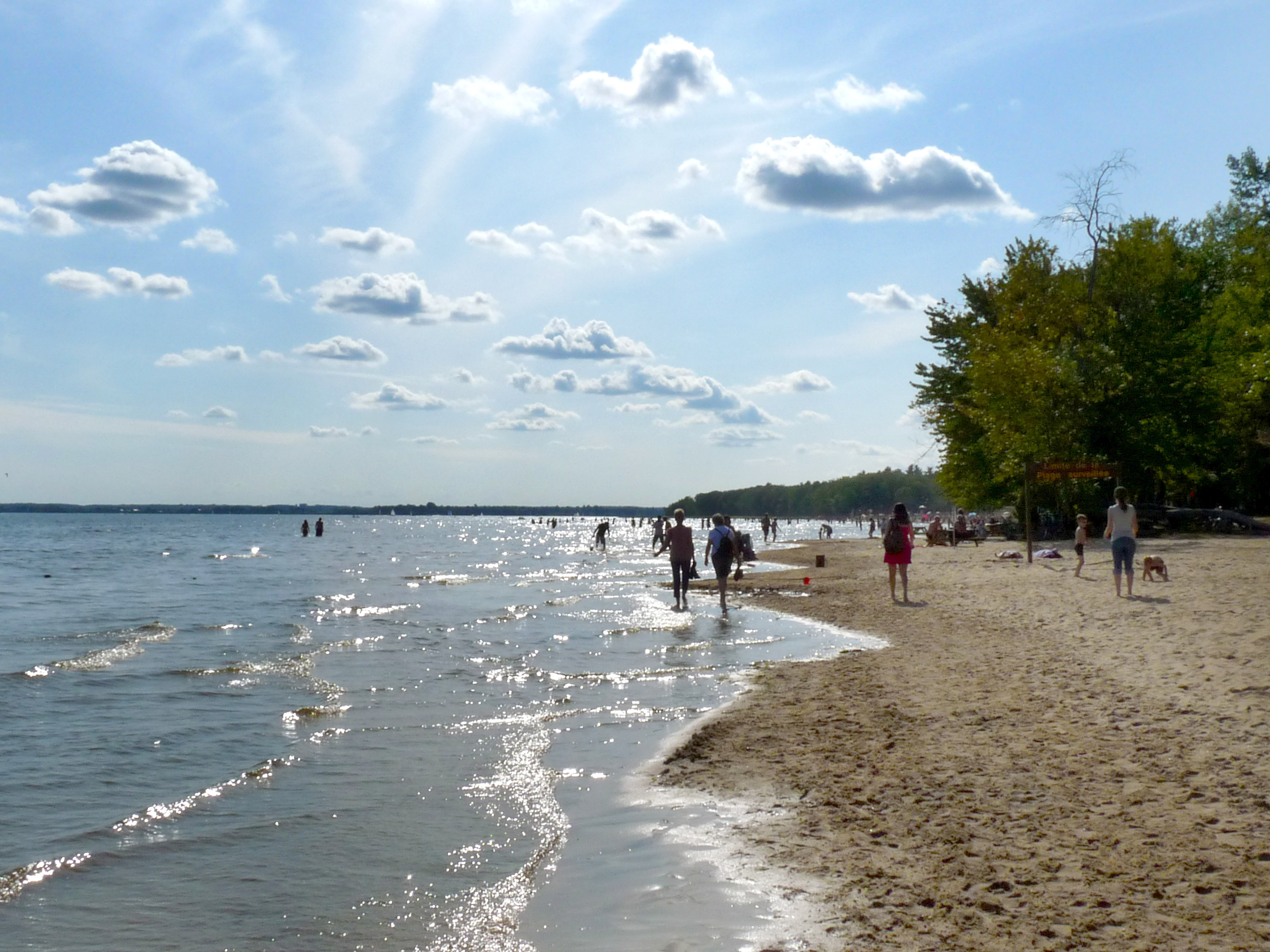 Oka beach!